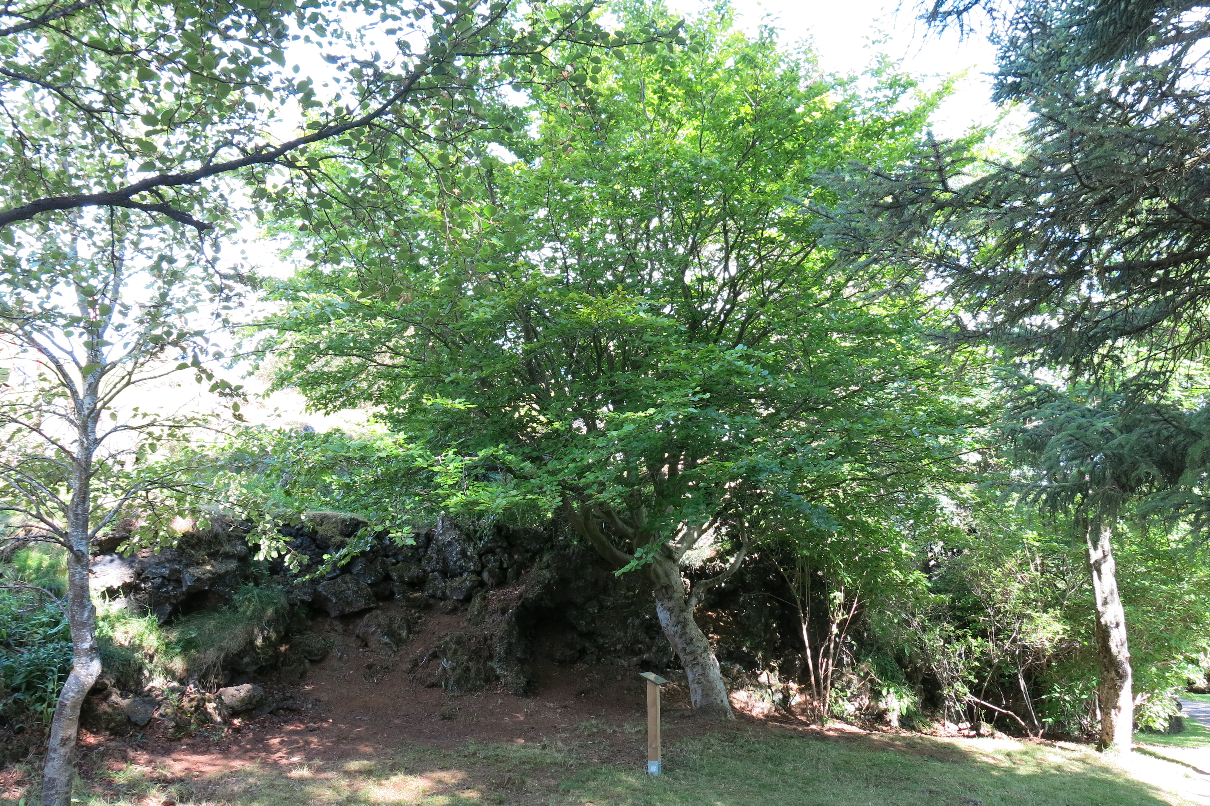 Tree of the Year 2017 in Hellisgerði, Hafnarfjörður, Iceland.